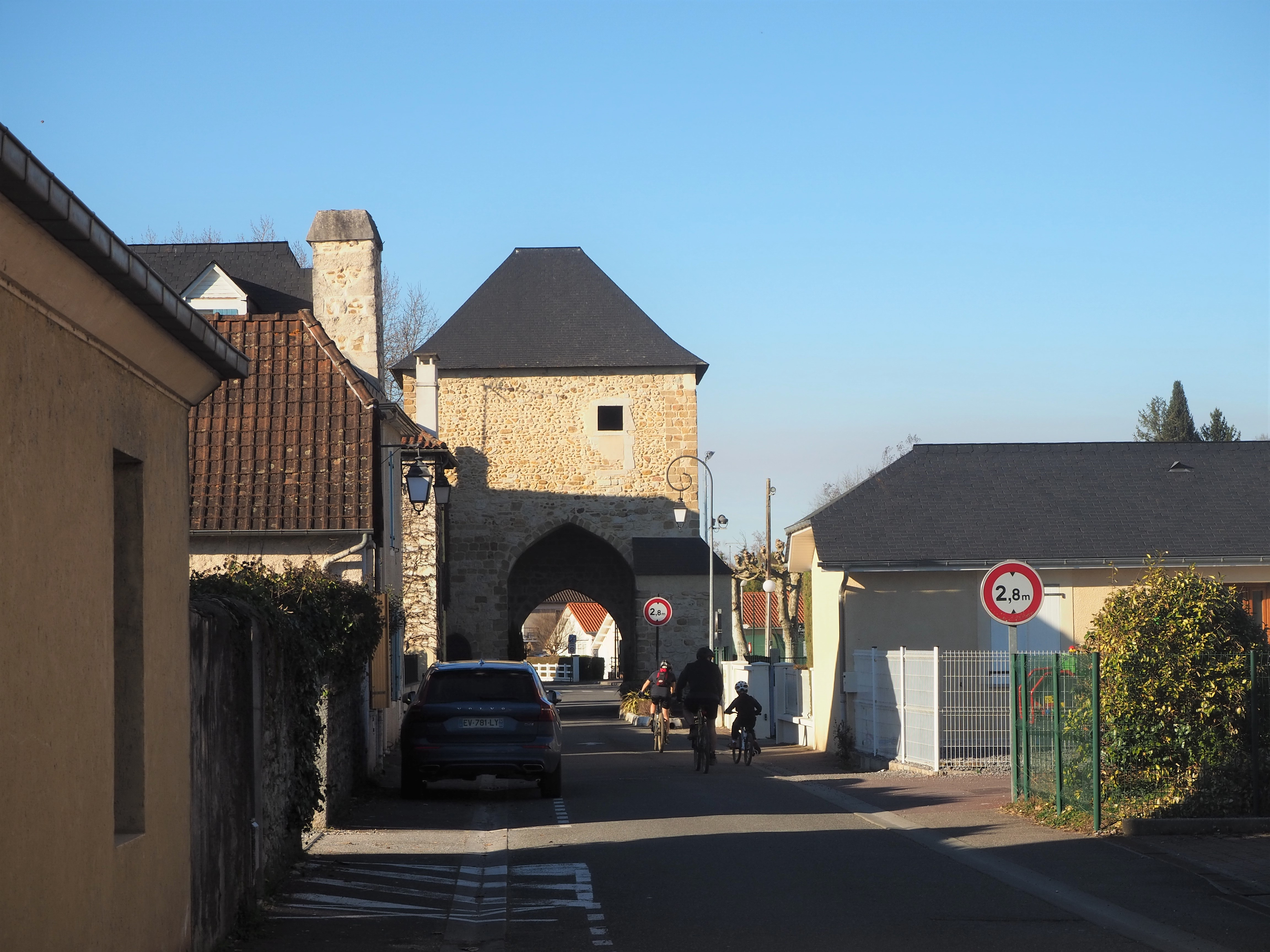 Porte de Gan.